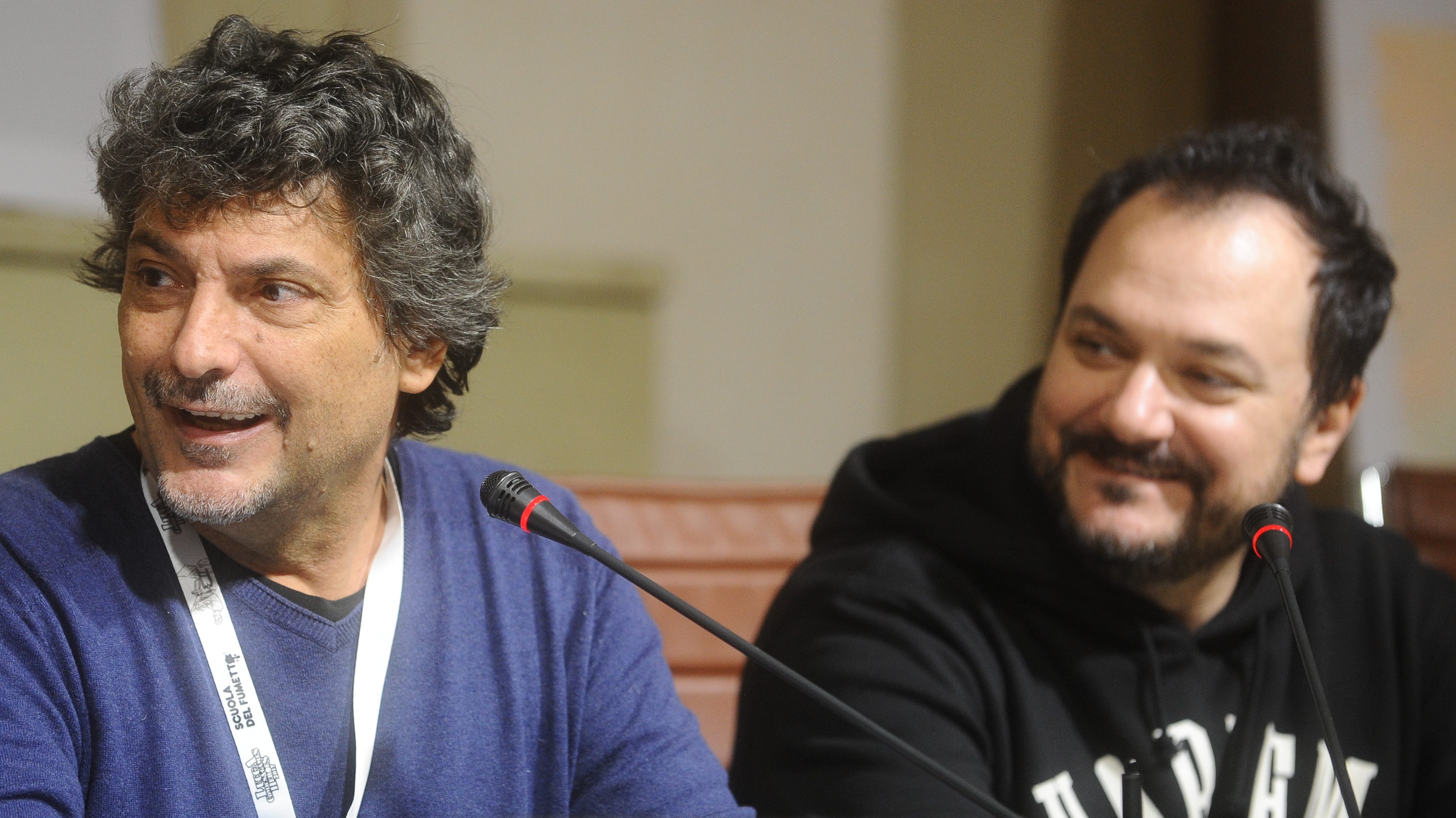 Fausto Vitaliano e Claudio Sciarrone. Sala Tobino. Palazzo Ducale. Lucca.